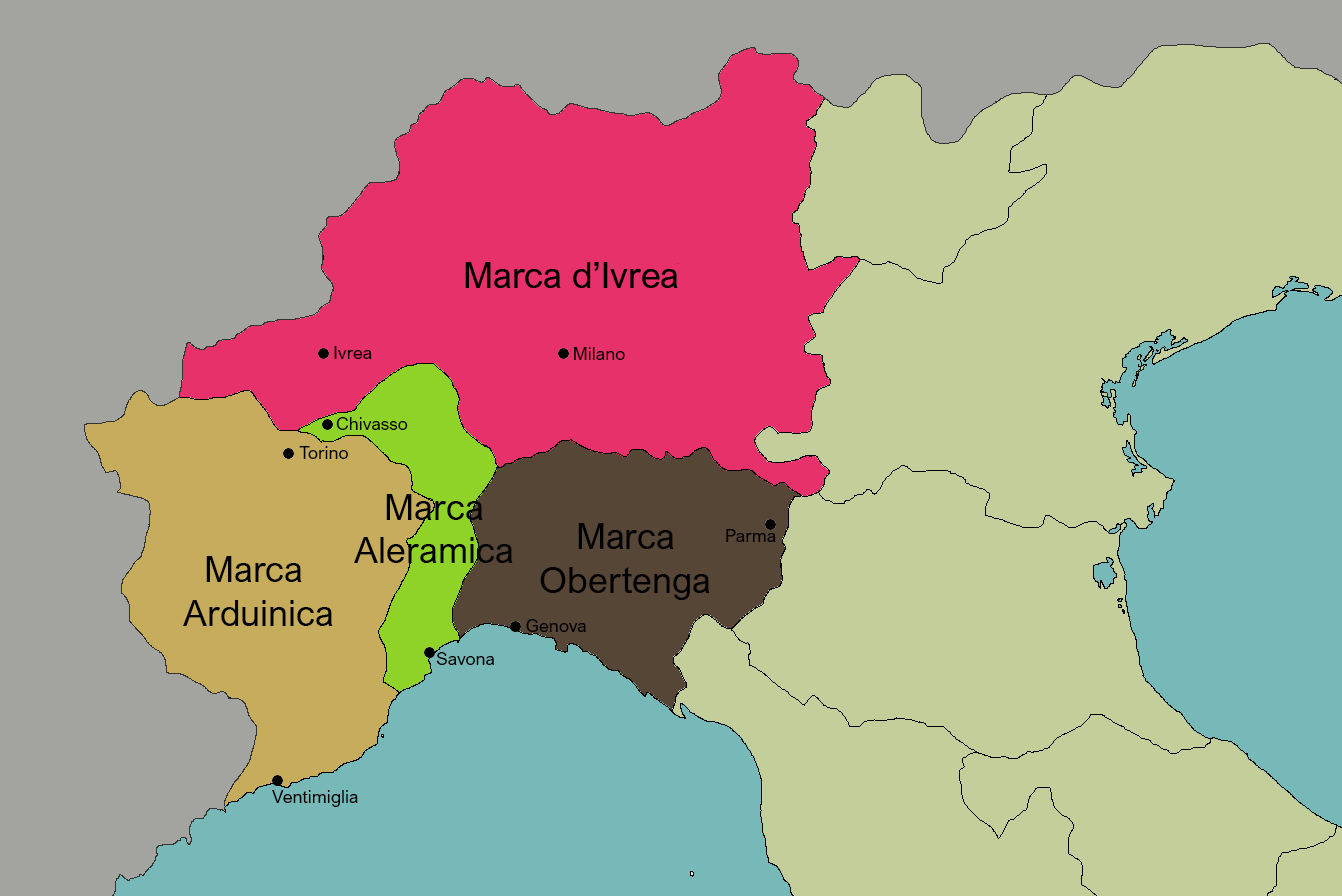 Suddivisione del Ducato di Lombardia fatta da Berengario II d'Ivrea nel X secolo